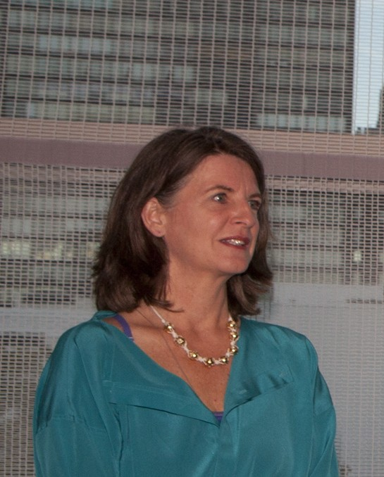 Bij publicatie vermelden: Foto Chantal Heijnen